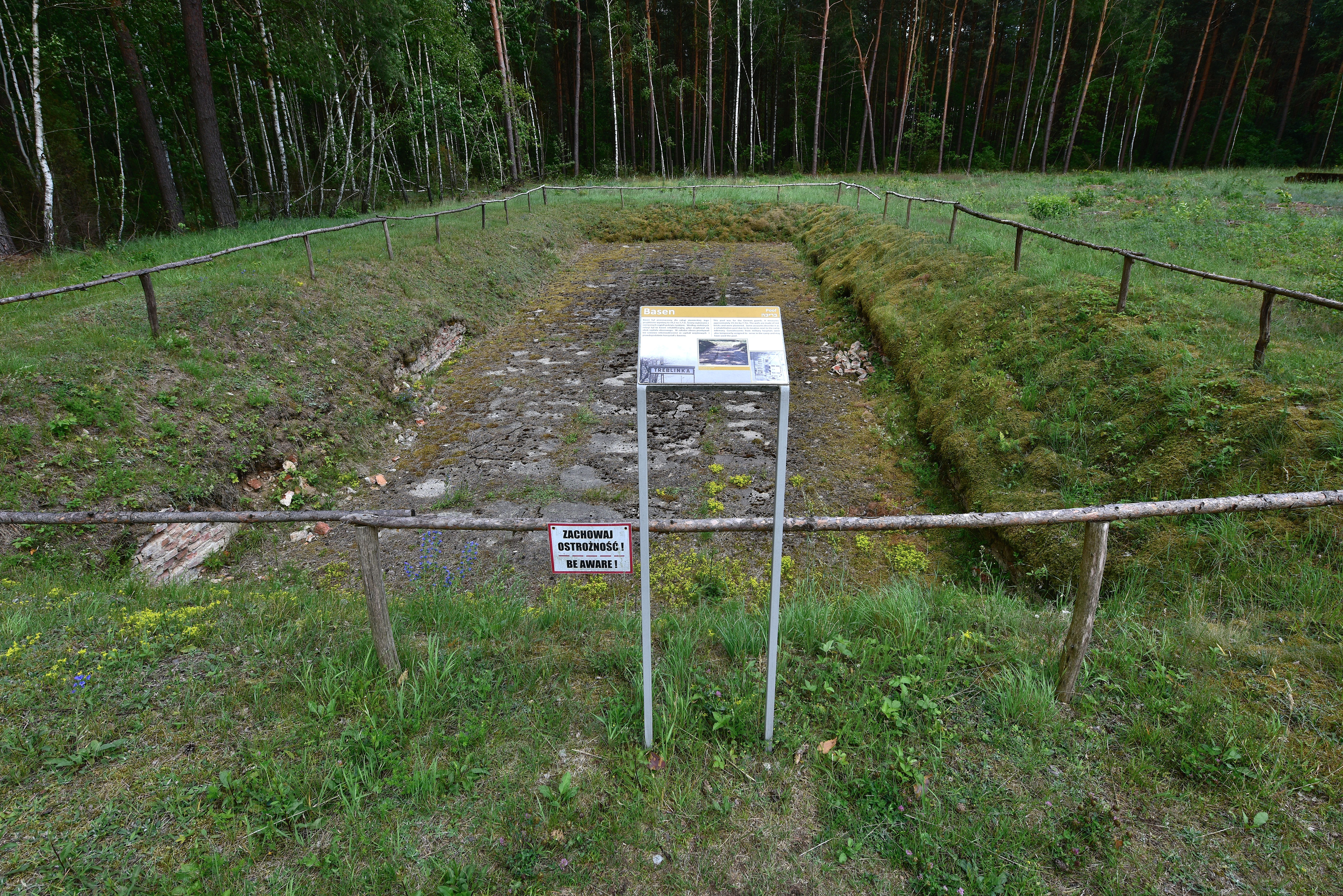 Karny obóz pracy w Treblince. Basen dla załogi niemieckiej